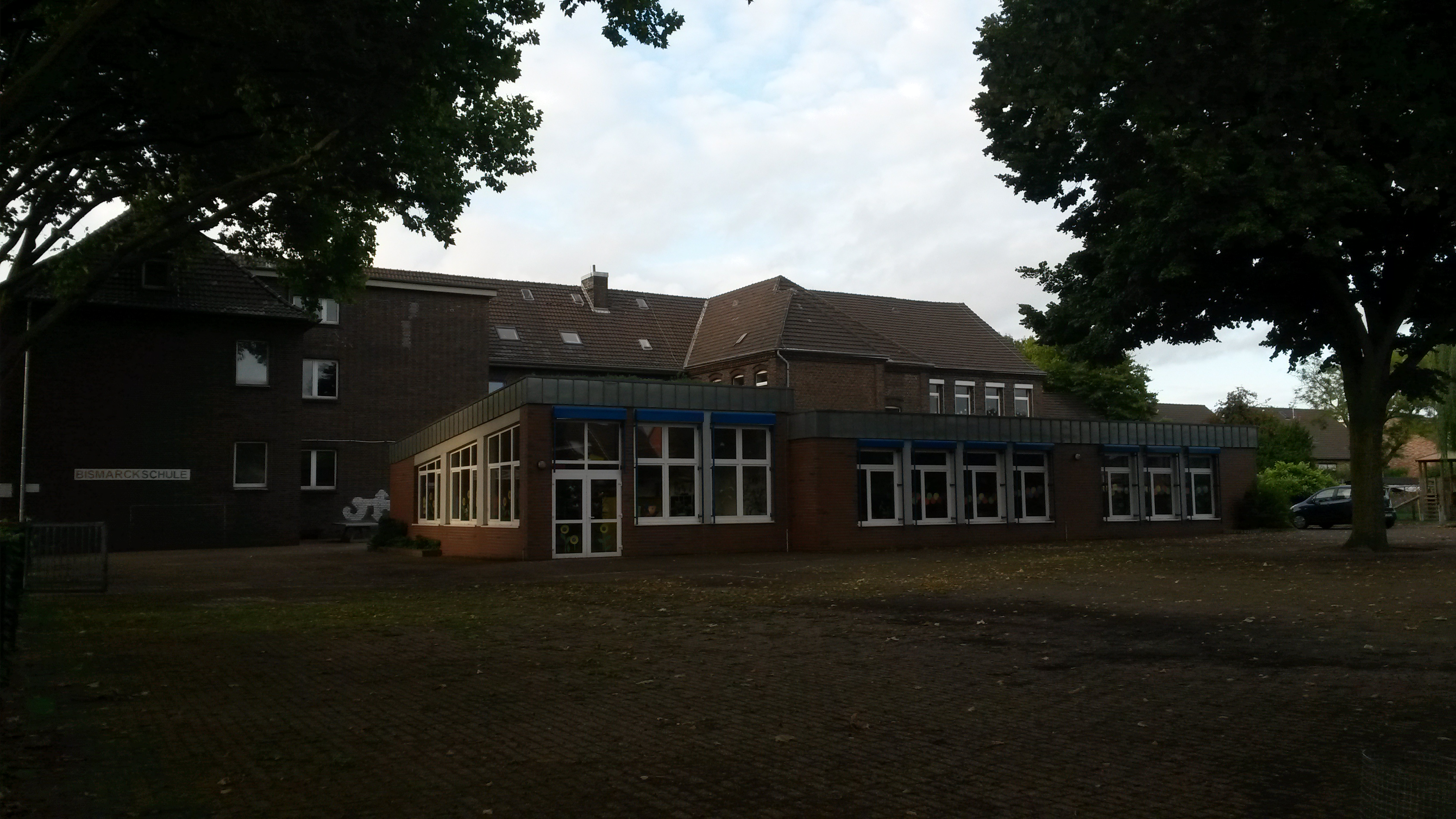 Die Bismarckschule in Alstaden (Oberhausen)